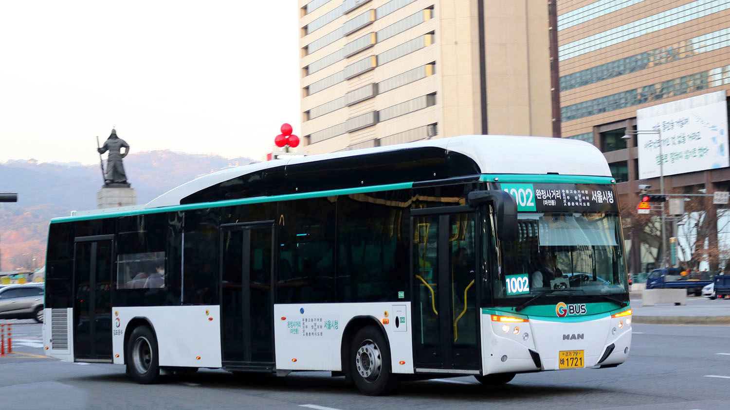 김포운수 1002번 MAN 라이온즈시티